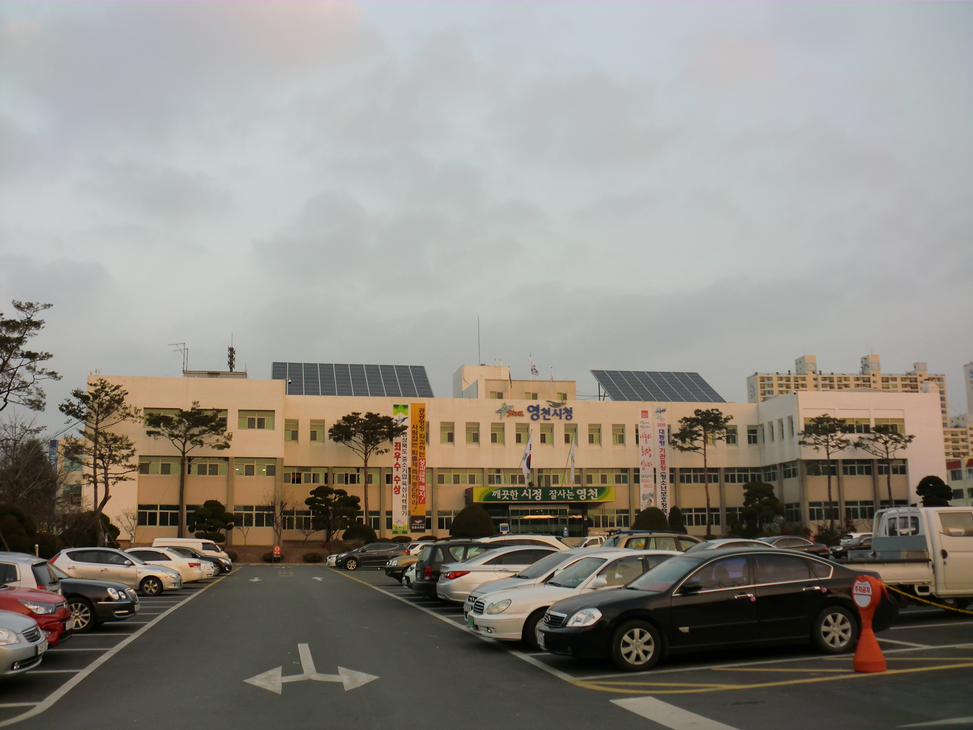 경상북도 영천시에 있는 영천시청